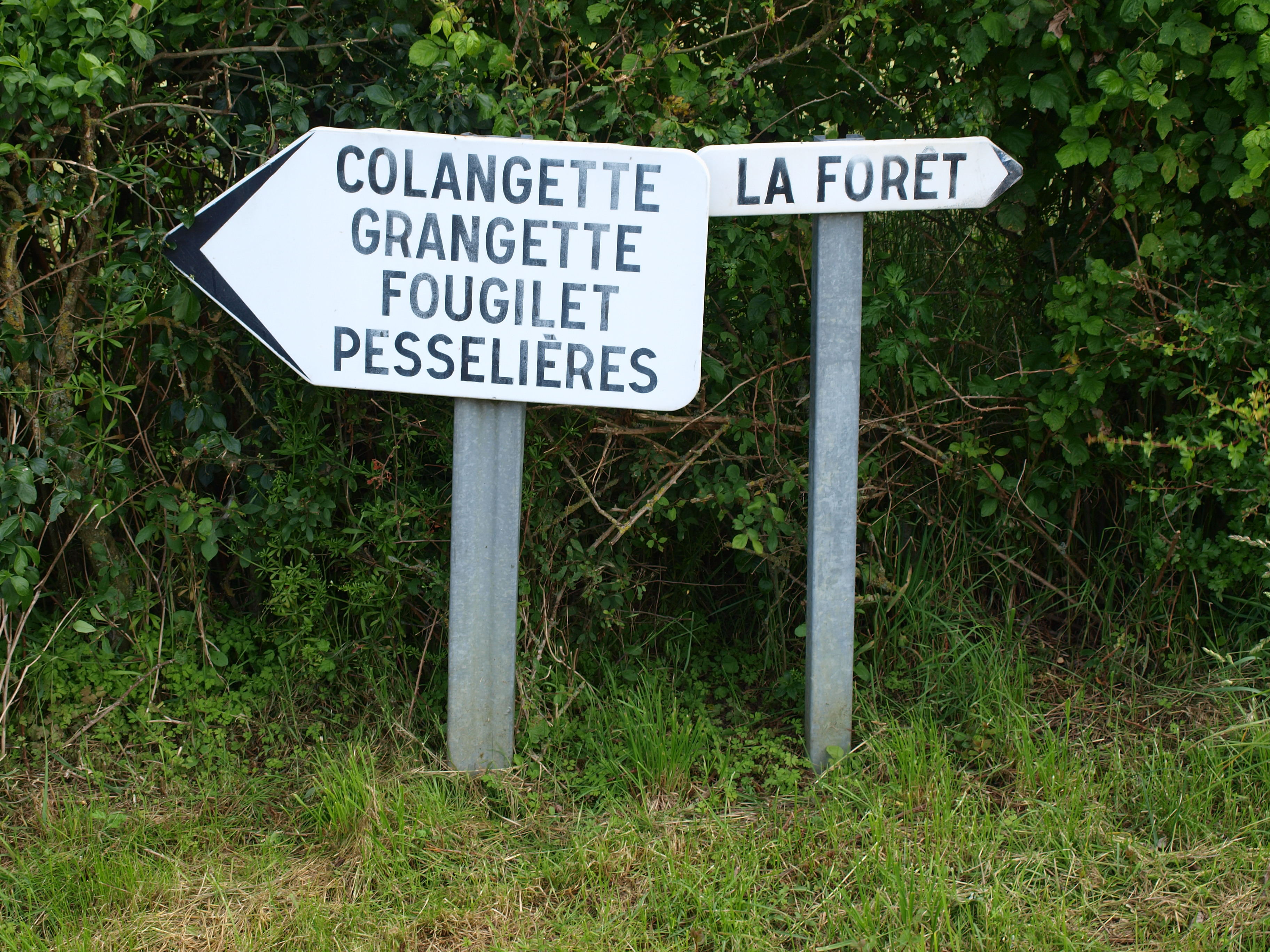 Thury (Yonne, France)